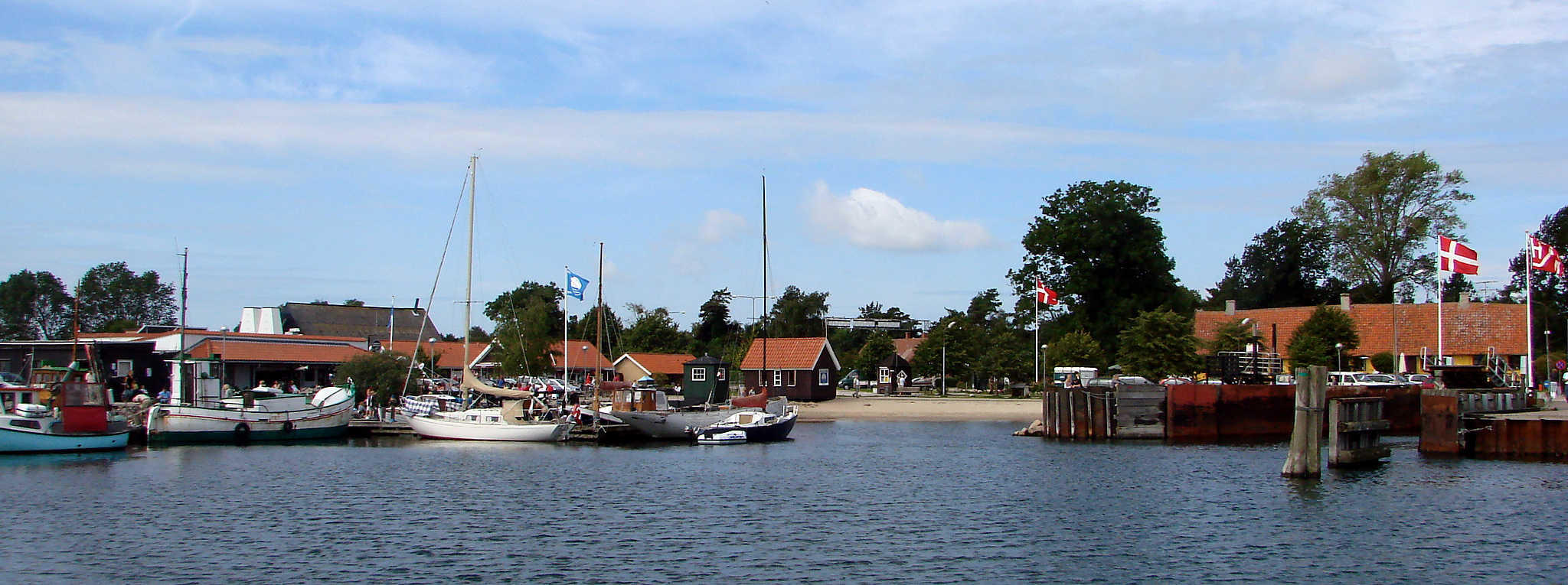 Rørvig havn set fra færgen